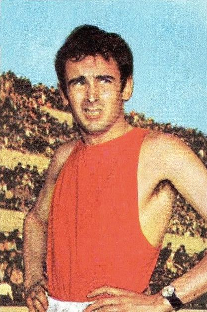 CAMPIONI dello SPORT 1970/71-n.34- CLERC - ATLETICA LEGGERA